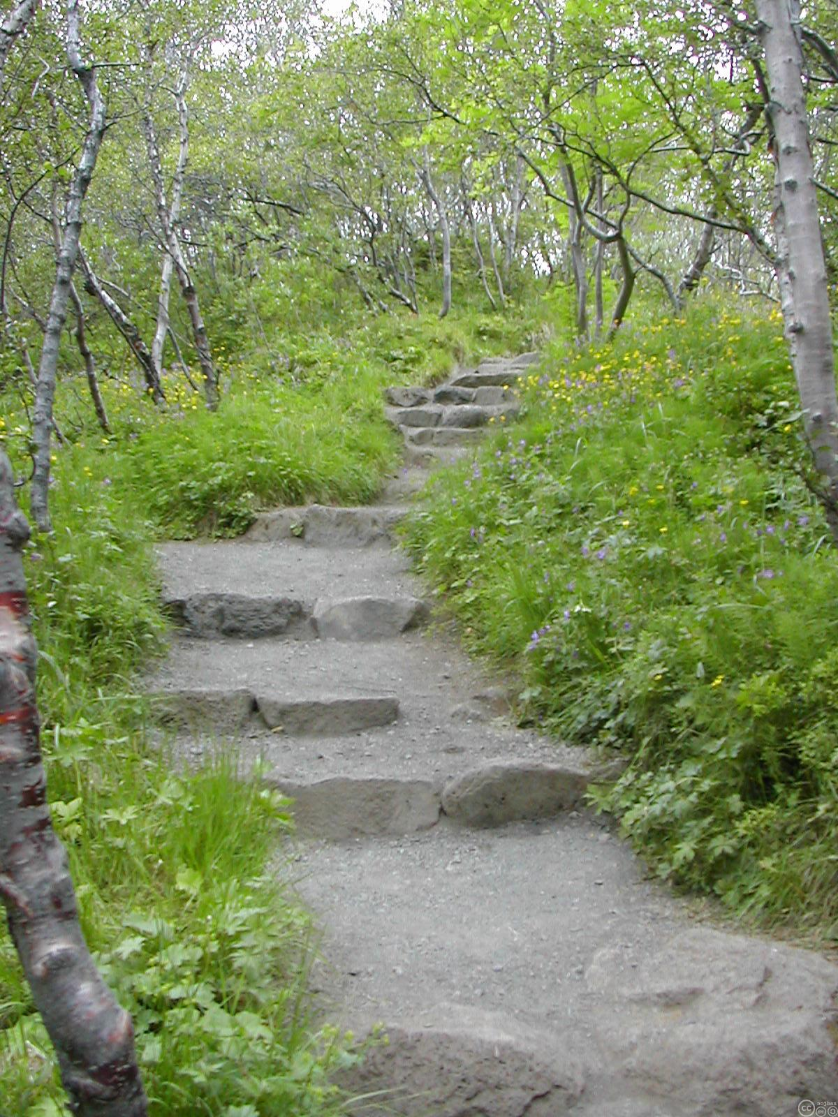 Le bois d'Ásbyrgi Catégorie:Image d'Islande La photographie a été prise en juillet 2004 par Armelle Dréo (nojhan) au niveau de l'escalier qui remonte depuis la plateforme en bois sur le lac. Taille de l'image : 1600 x 1200, photographie à l'appareil numérique.